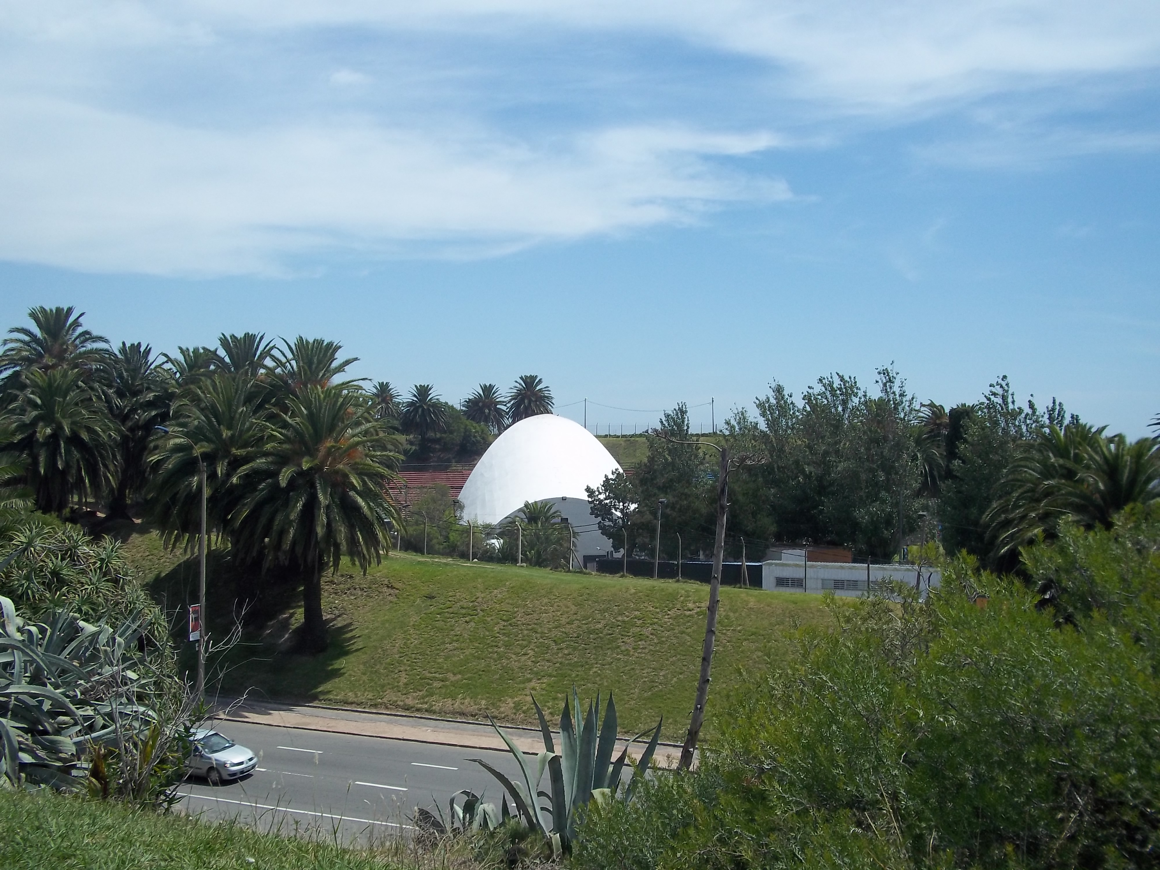 Entrada del Teatro de Verano Ramón Collazo. Parque Rodó